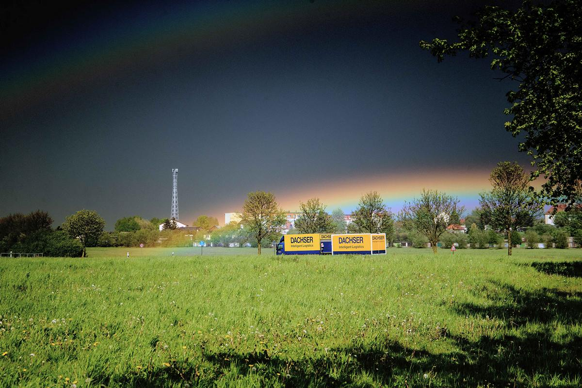 Doppelter Regenbogen über Röbel